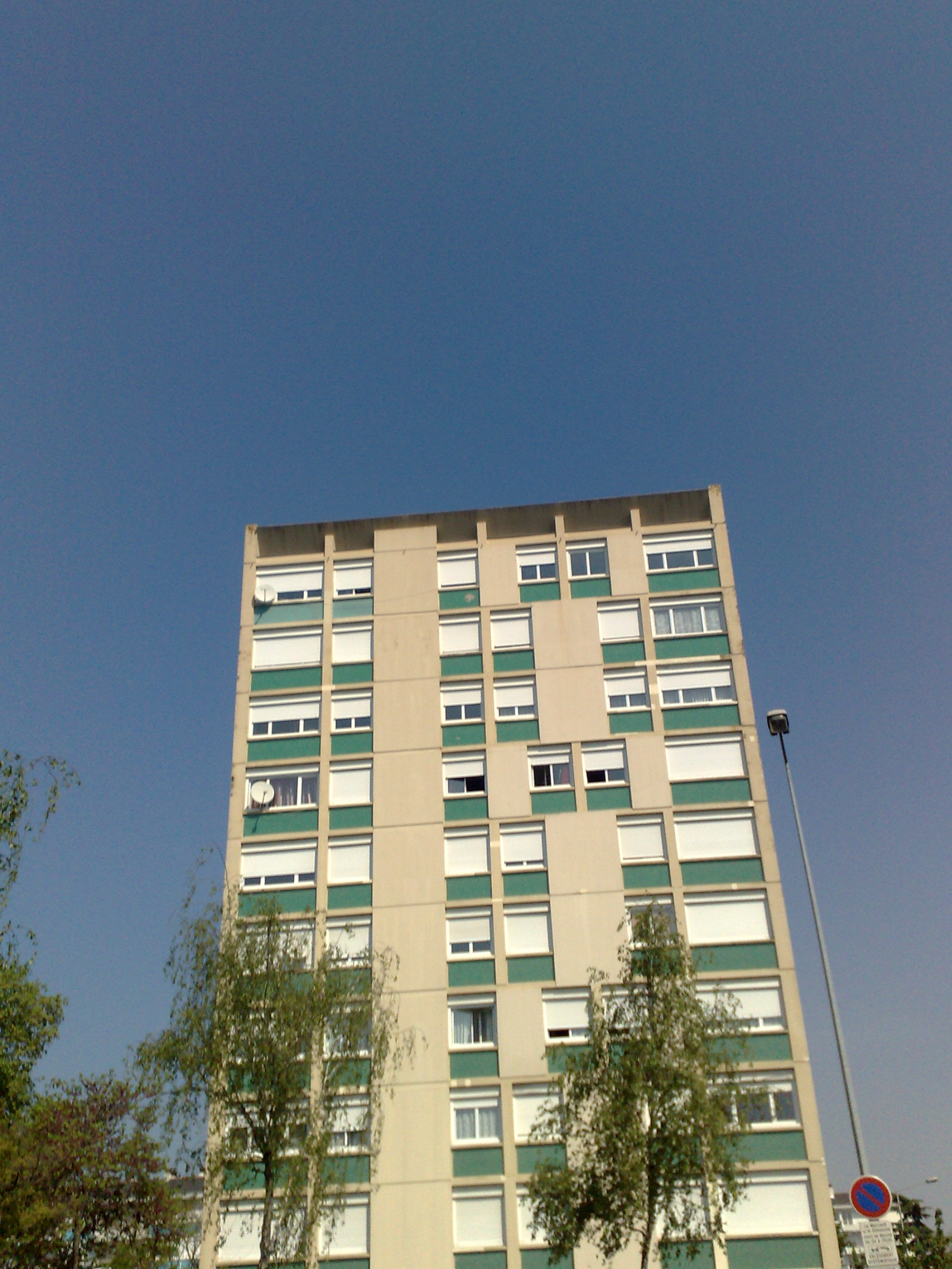 La Tour Gallièni à Angers (Monplaisir).